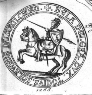 Béla, Duke of Slavonia